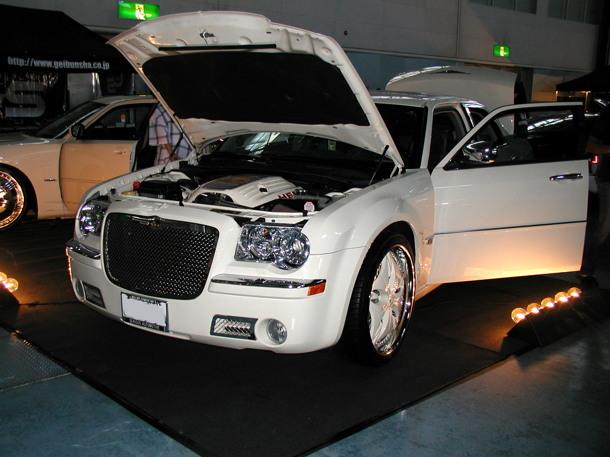 300C on event